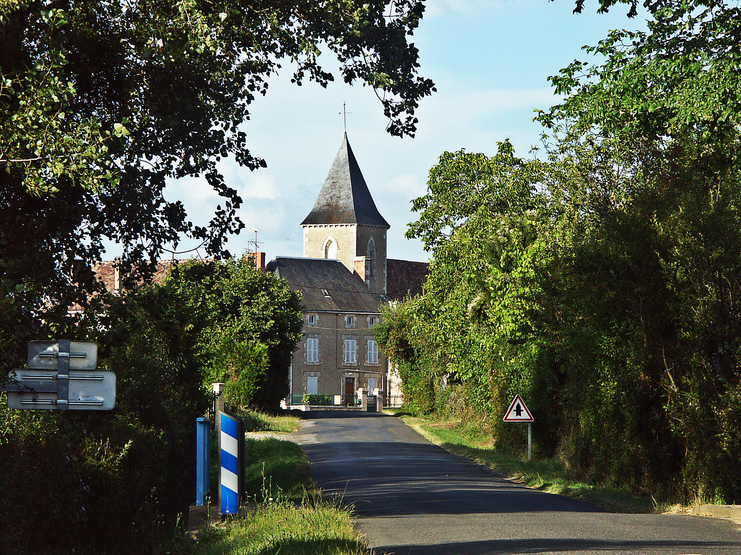 Église de Haims, Vienne